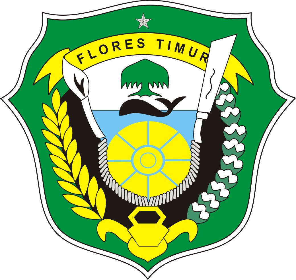 Diperoleh dari Situs Resmi Pemerintah Kabupaten Flores Timur